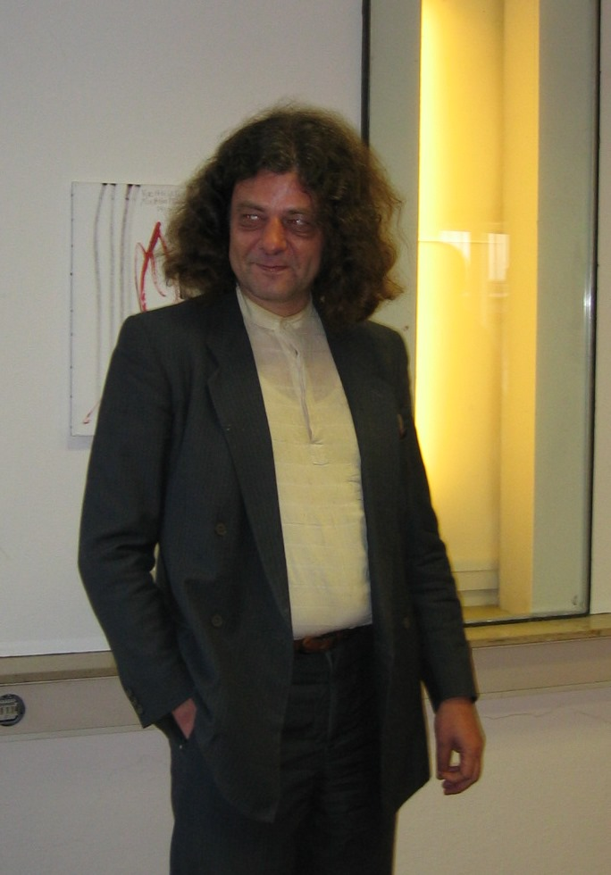 Matthias J. Maaß, am 29.05.2004 auf einer Vernissage des Atelier Unsichtbar in Stuttgart